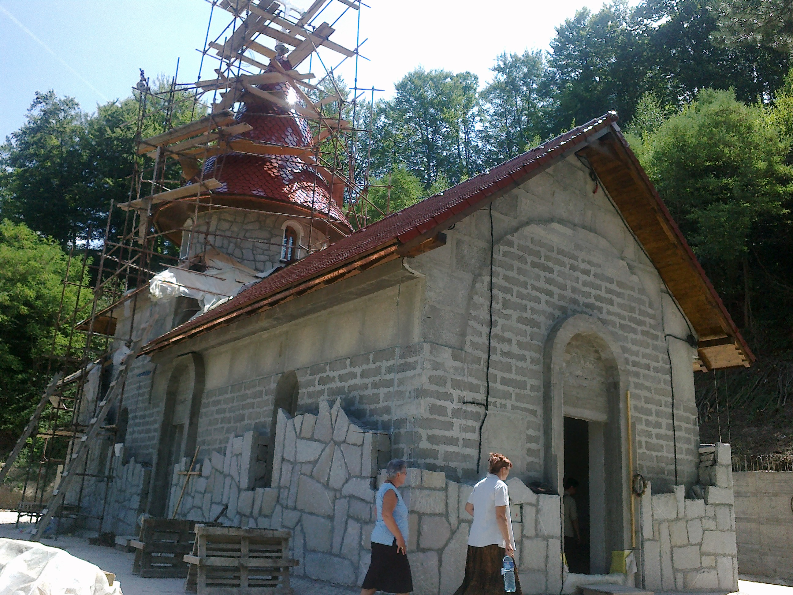 Novi manastir u izgradnji, Radovašnica 2012. godine, slobodno se može koristiti i u bilo koje svrhe pod jednim uslovom da se navede da sam autor slike.